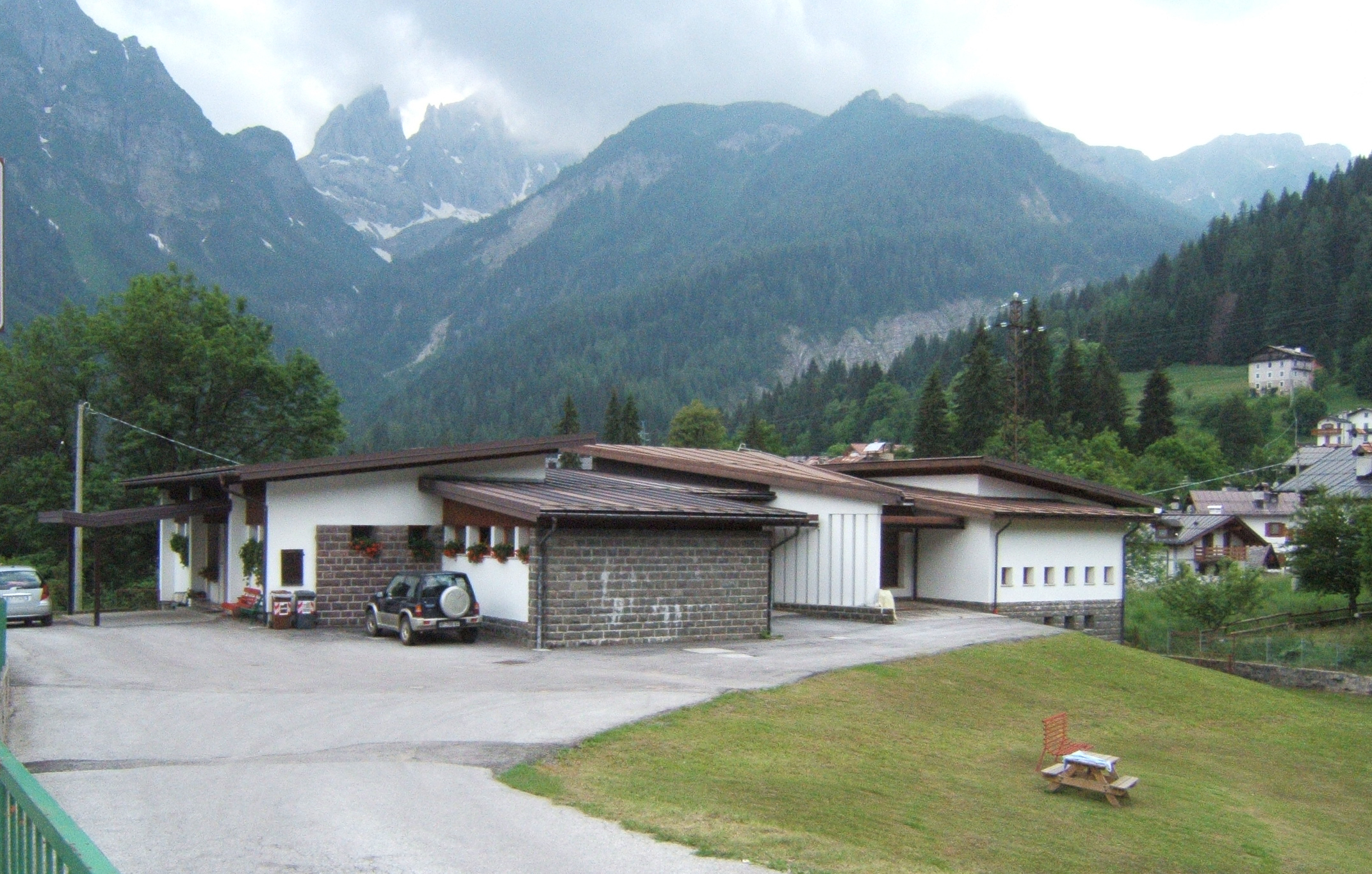 Ohannés Gurekian - Asilo Infantile di Falcade - 1953